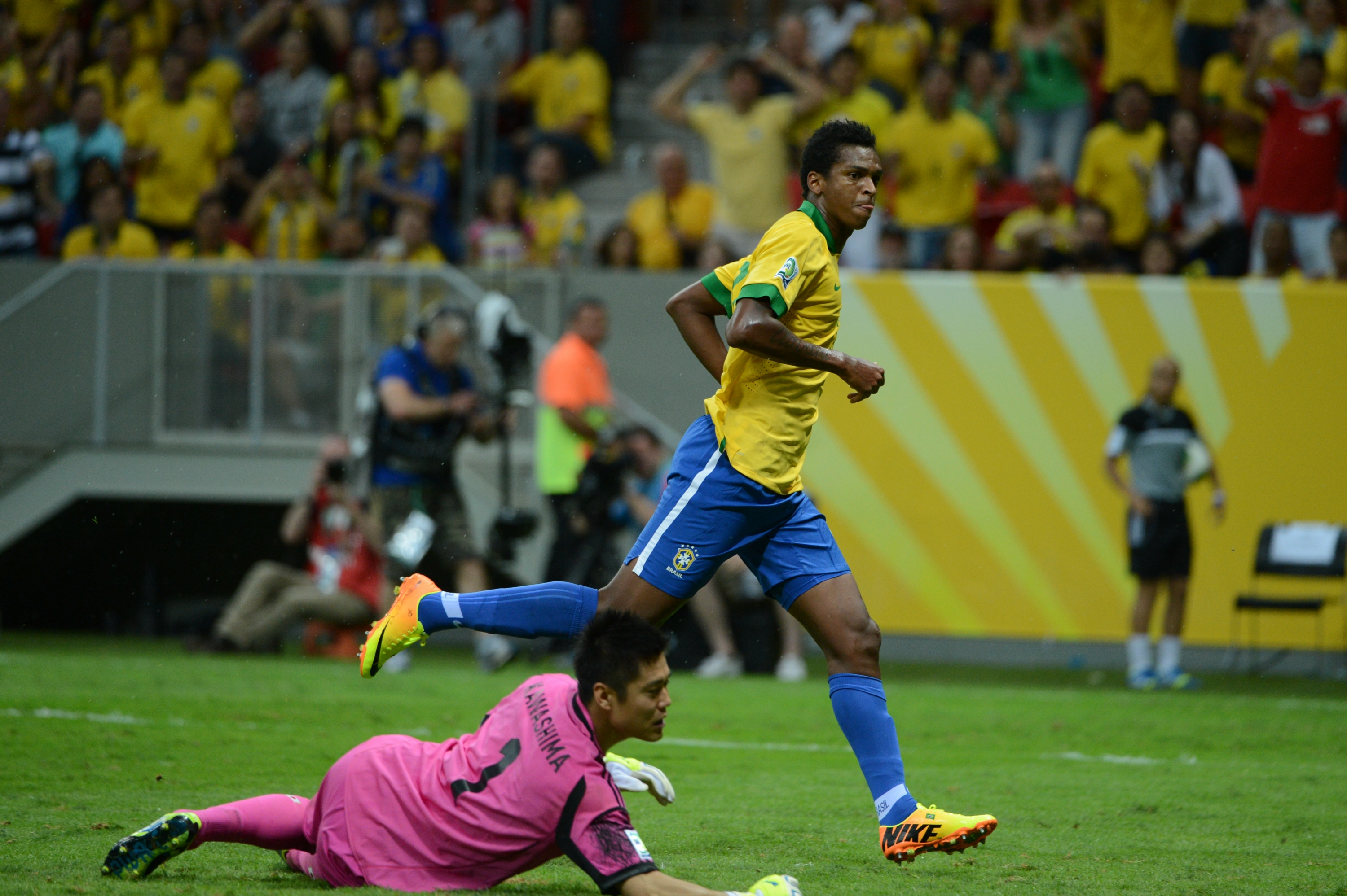 Jogo entre Brasil e Japão abre a Copa das Confederações